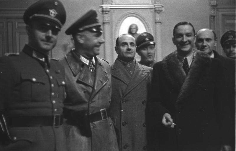 Information added by Wikimedia users.Marseille.- deutsch-französische Besprechung im Hôtel de Ville. v.l.n.r.: unbekannt; SS-Sturmbannführer Bernhard Griese, Antoine Lemoine (Regionalpräfekt), Rolf Mühler (Kommandeur der Sicherheitspolizei Marseille), René Bousquet (Generalsekretär der Vichy-Polizei), Pierre Barraud (Bürgermeister von Marseille)